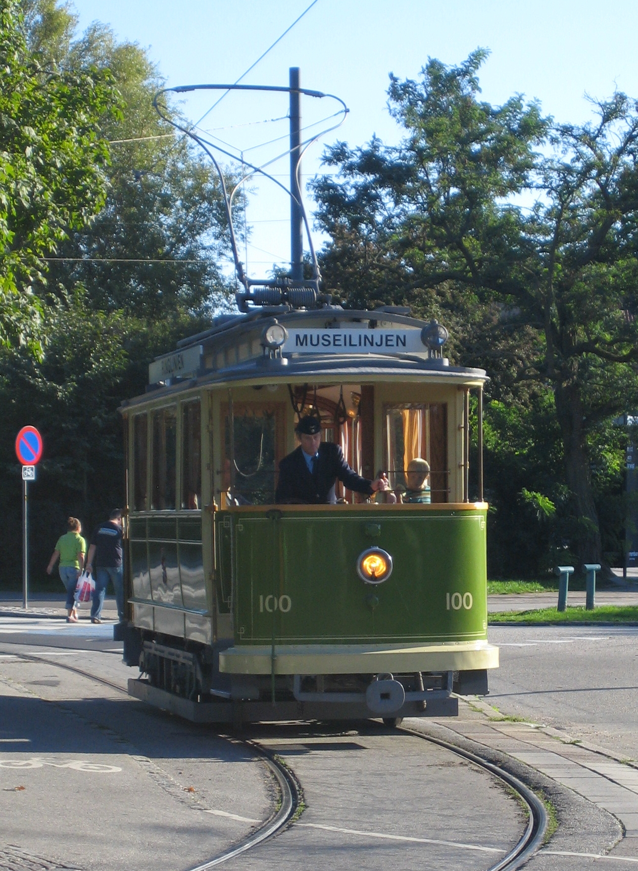 Museispårvagn nr 100, Malmö, Sweden